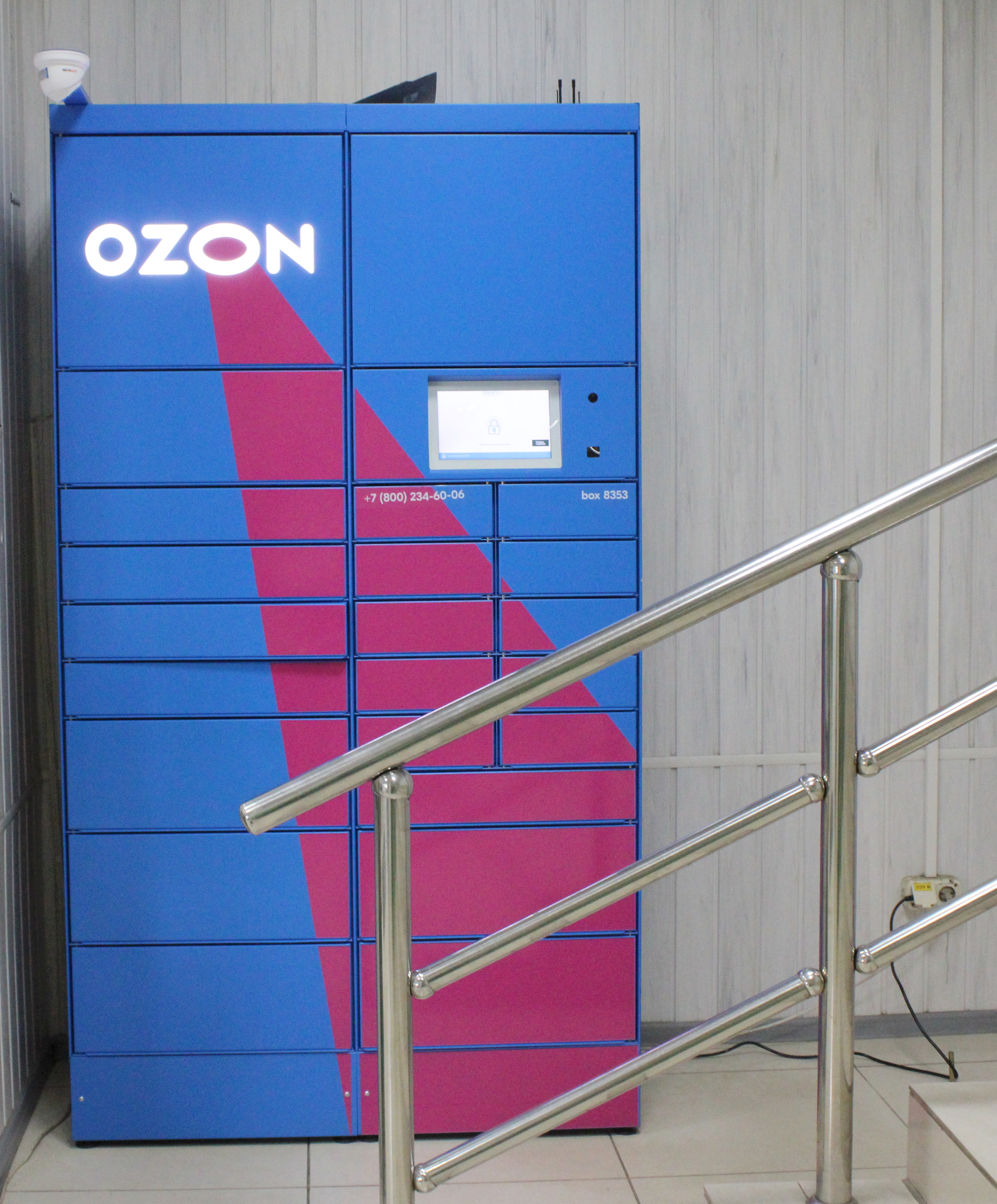 Постамат интернет-магазина «Ozon.ru» в супермаркете «Елисей» (Екатеринбург, улица Щербакова, 43)